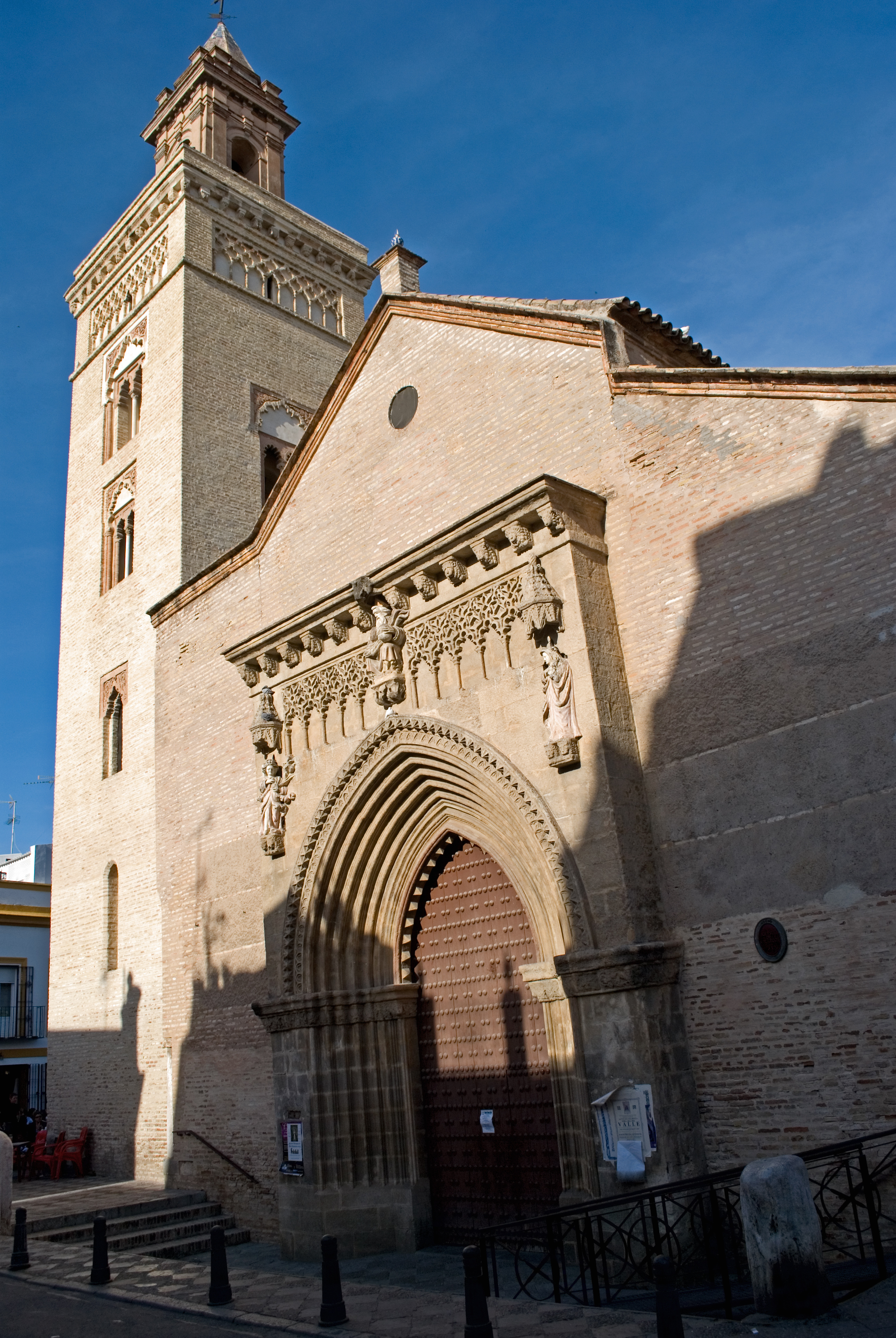 Fachada y torre de iglesia de San Marcos, Sevilla.